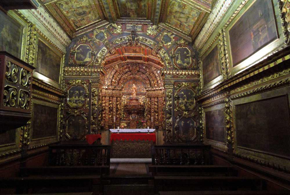 Nave da Igreja de Nossa Senhora do Ó